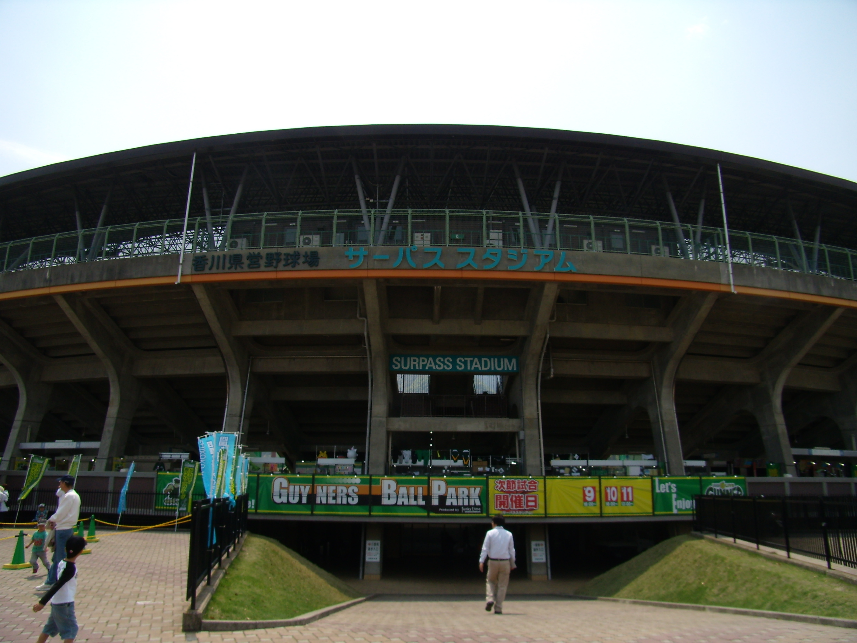 ”サーパススタジアム”の表記もある。 また、”ガイナーズボールパーク”のロゴも確認できる。